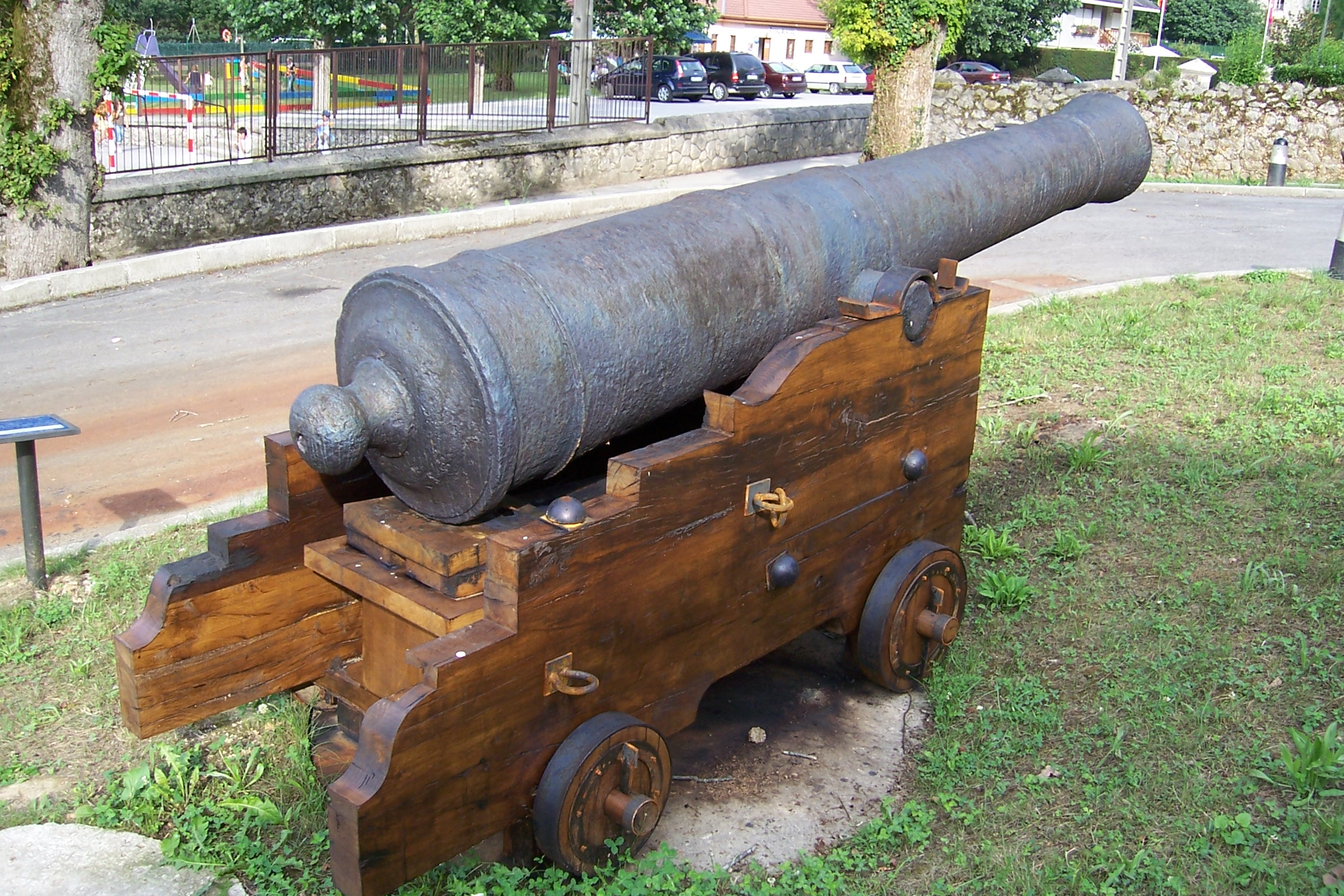 La Cavada, en el municipio de Riotuerto (Cantabria, España). Este cañón pertenecía al fuerte de San Carlos, en el monte de Santoña, y fue fundido en la Real Fábrica de Artillería de La Cavada.